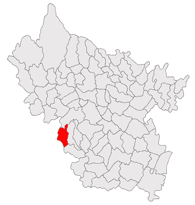 Categorie:Hărţi ale judeţului Buzău